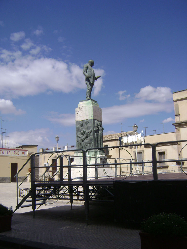 Monumento a Luigi Capuana